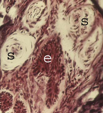 Sensorische Endkörperchen am Juxtaoralen Organ, W. Zenker